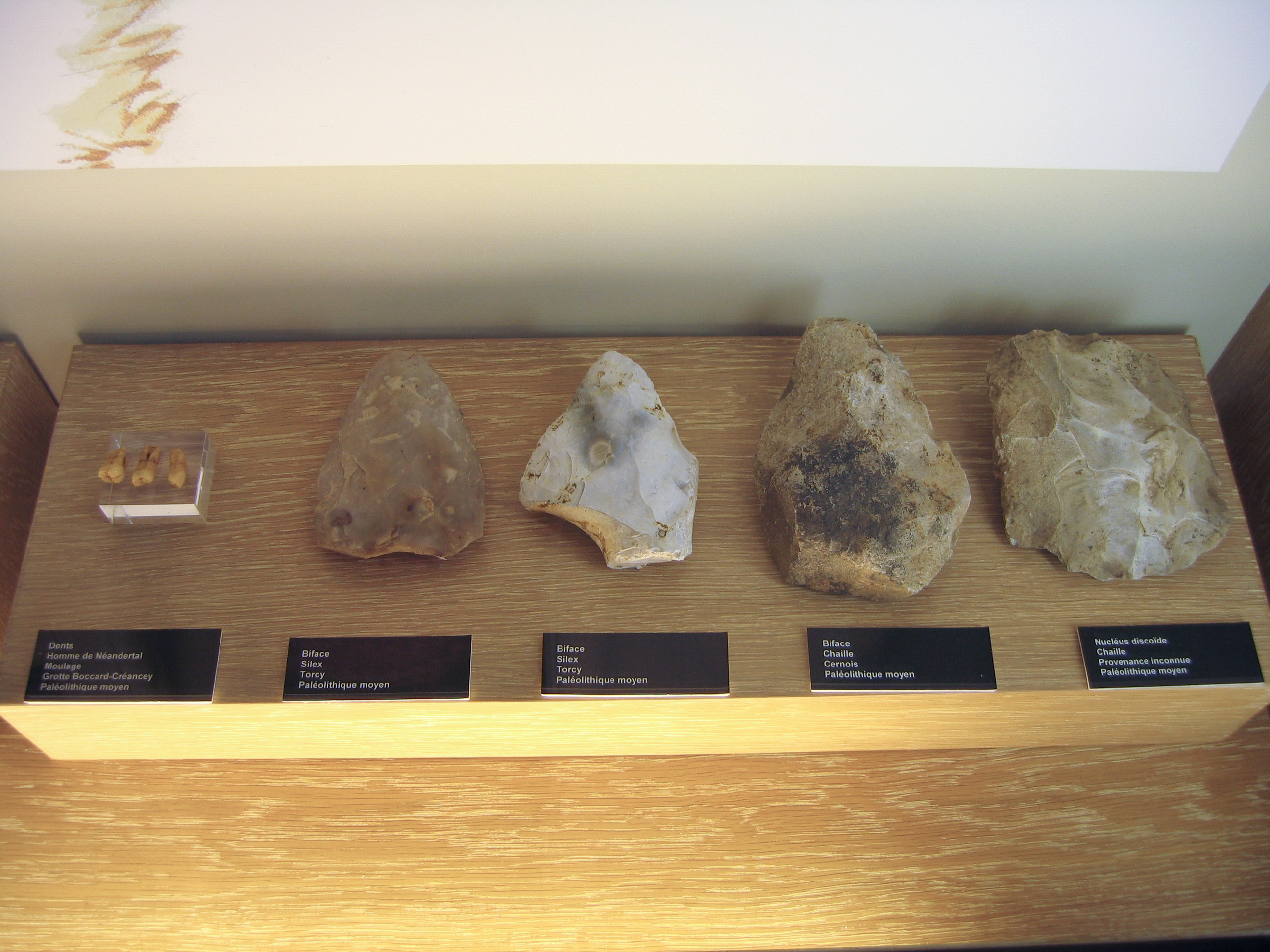 dents bifaces nucléus musée archéologique de Dijon France